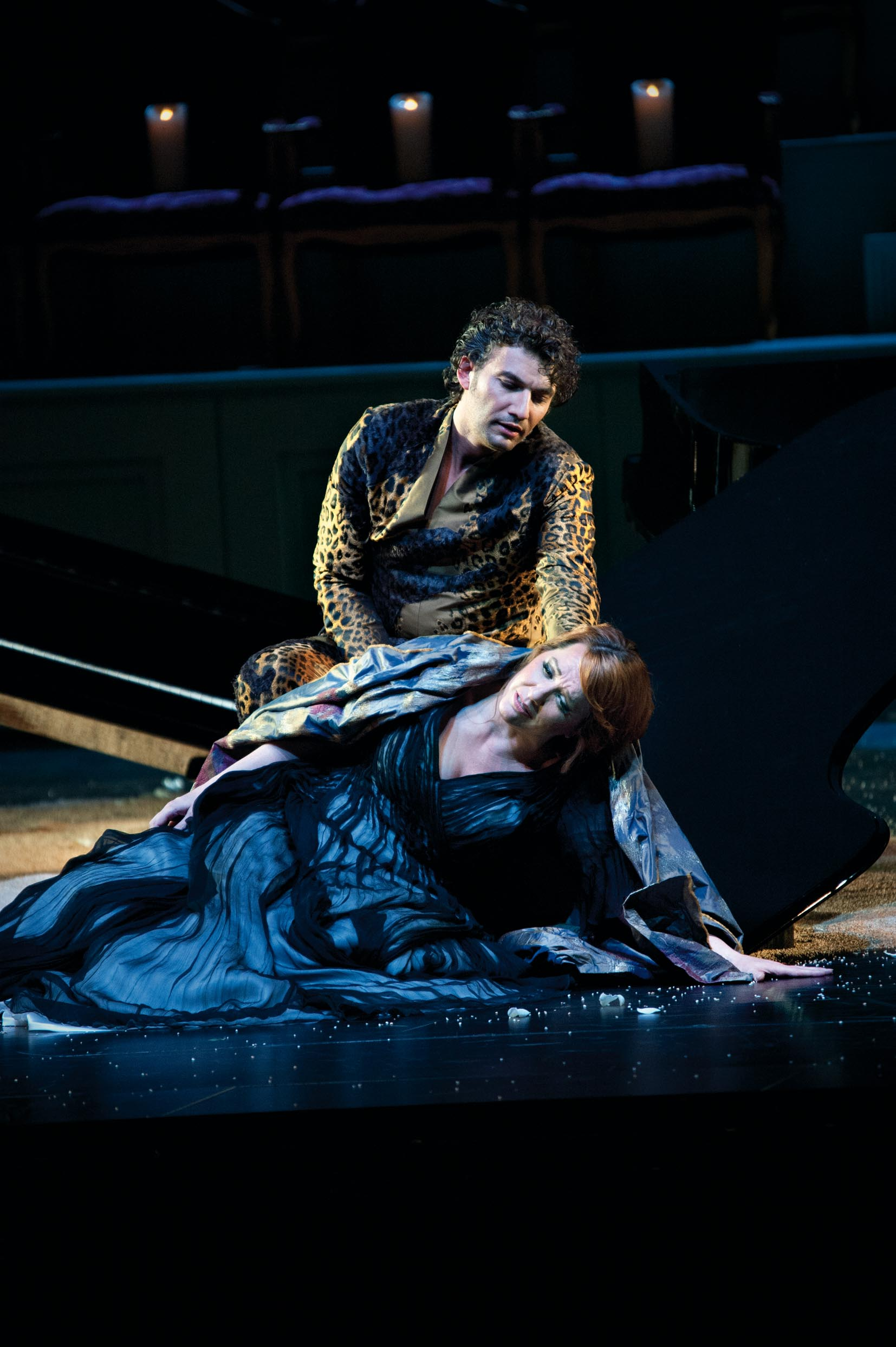 Salzburger Festspiele 2012 – Jonas Kaufmann und Emily Magee in Ariadne auf Naxos